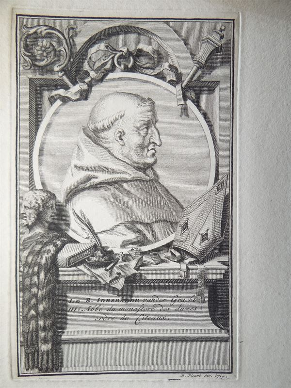 Idesbaldus vander Gracht, Abbé du monastere de dunes ordre de Citeaux. Kopergravure naar Bernard Picart, 17